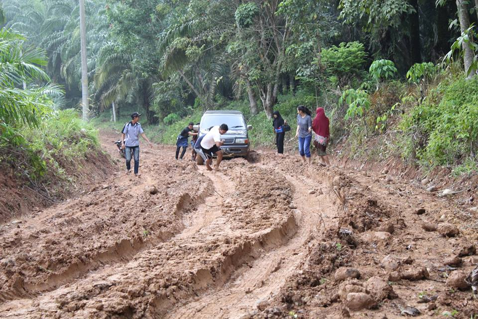 Kondisi jalan saat musim hujan